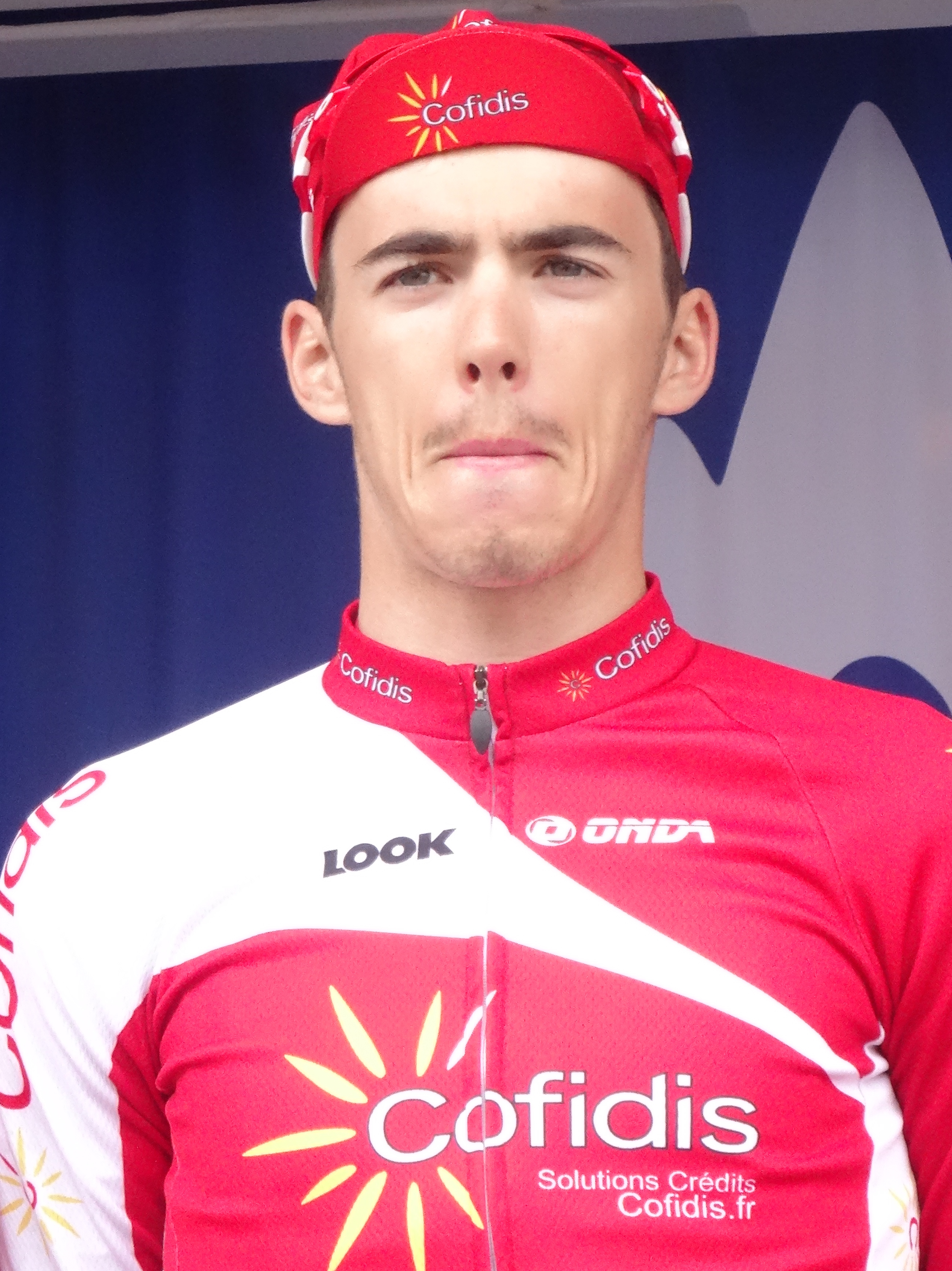 Reportage photographique réalisé le jeudi 8 mai 2014 au départ de la deuxième étape de l'édition 2014 des Quatre jours de Dunkerque à Hazebrouck, Nord, Nord-Pas-de-Calais, France. Depicted person: Christophe Laporte Depicted team: Cofidis